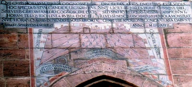 Sonnenuhr für Nürnberger Stunden: Das Zifferblatt enthält 9 "Zeilen" für ein Halbjahr. Die mittleren 7 werden im zweiten Halbjahr ebenfalls benutzt. Die Nürnberger Uhr wurde 16 mal im Jahr um 1/2 Stunde verstellt, was die Zählung von 8 bis 16 ganze Stunden für den Tag (als auch für die Nacht) annähernd zwischen Sonnenaufgang und -untergang (bzw. zw. -unter- und -aufgang) ermöglichte.